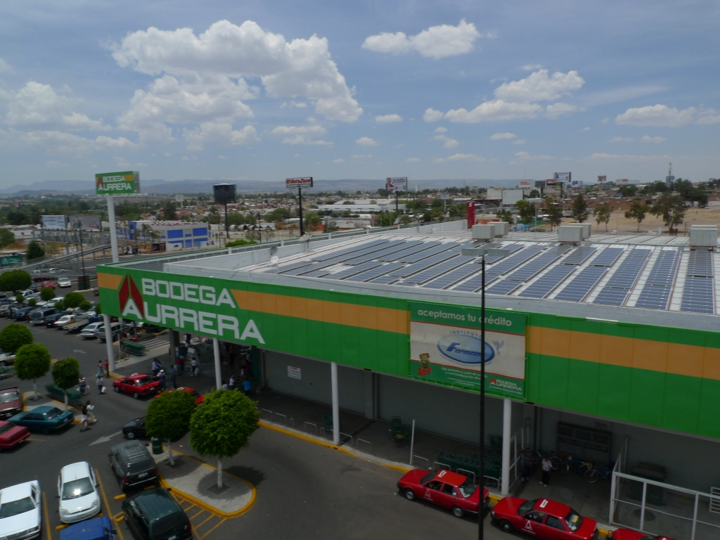 Supermercado Aurrera de Mexico